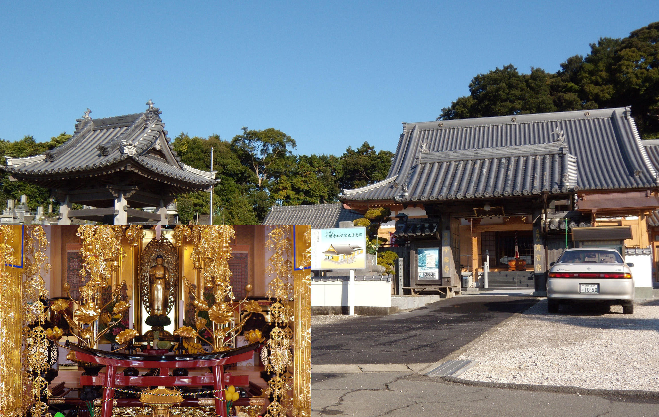 津乃峰山 千福寺（高野山真言宗）